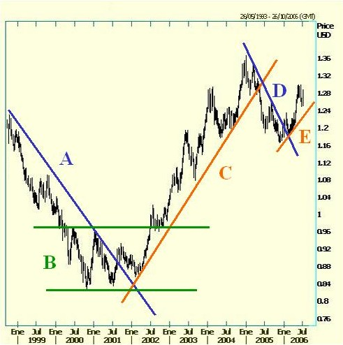 Ilustración de tendencias alcista, bajista y lateral sobre una gráfica semanal de euro/dólar 2001-2006